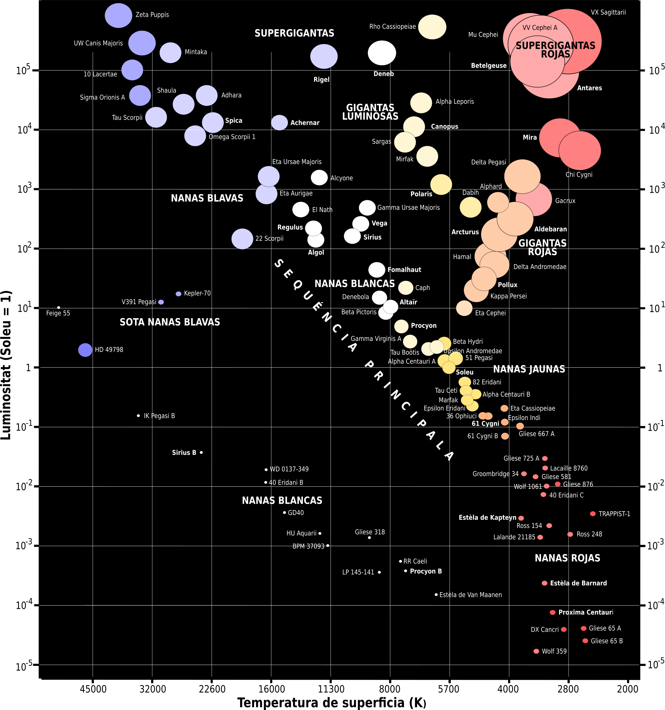 Diagrama Hertzsprung-Russell.